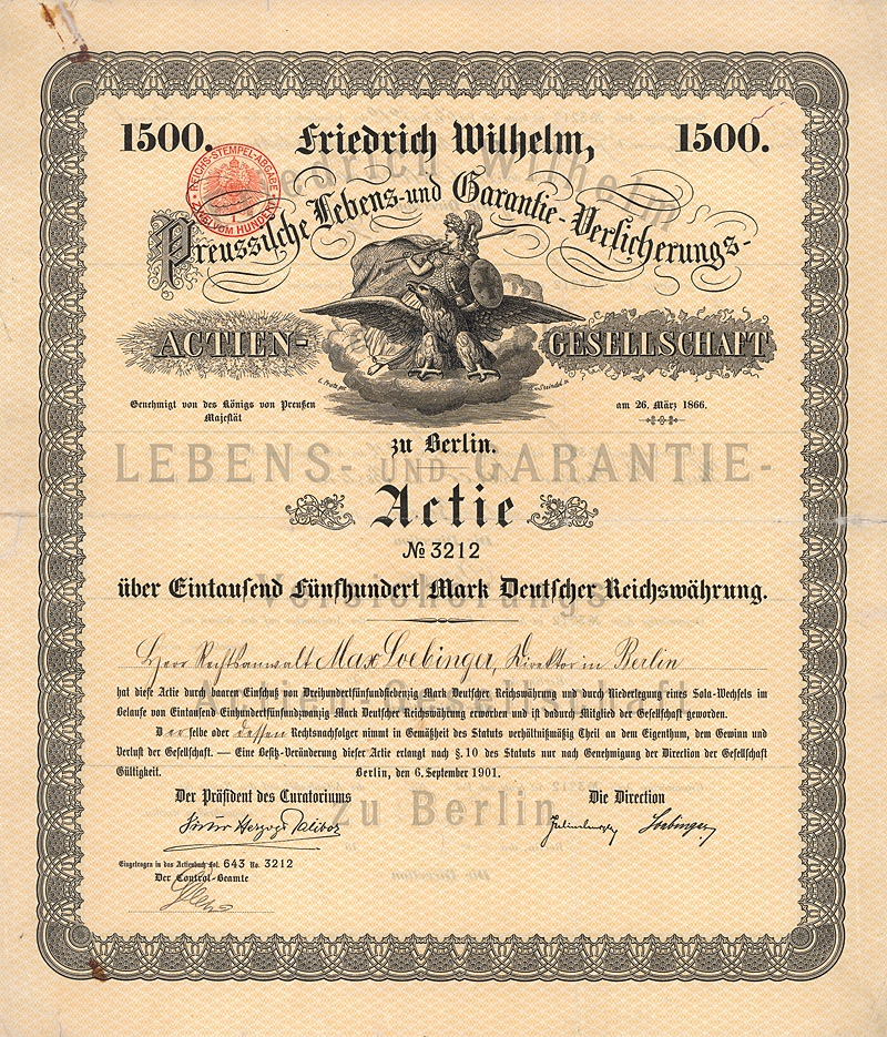 Aktie über 1500 Mark der Friedrich Wilhelm, Preussische lebens- und Garantie-Versicherungs-AG vom 6. September 1901